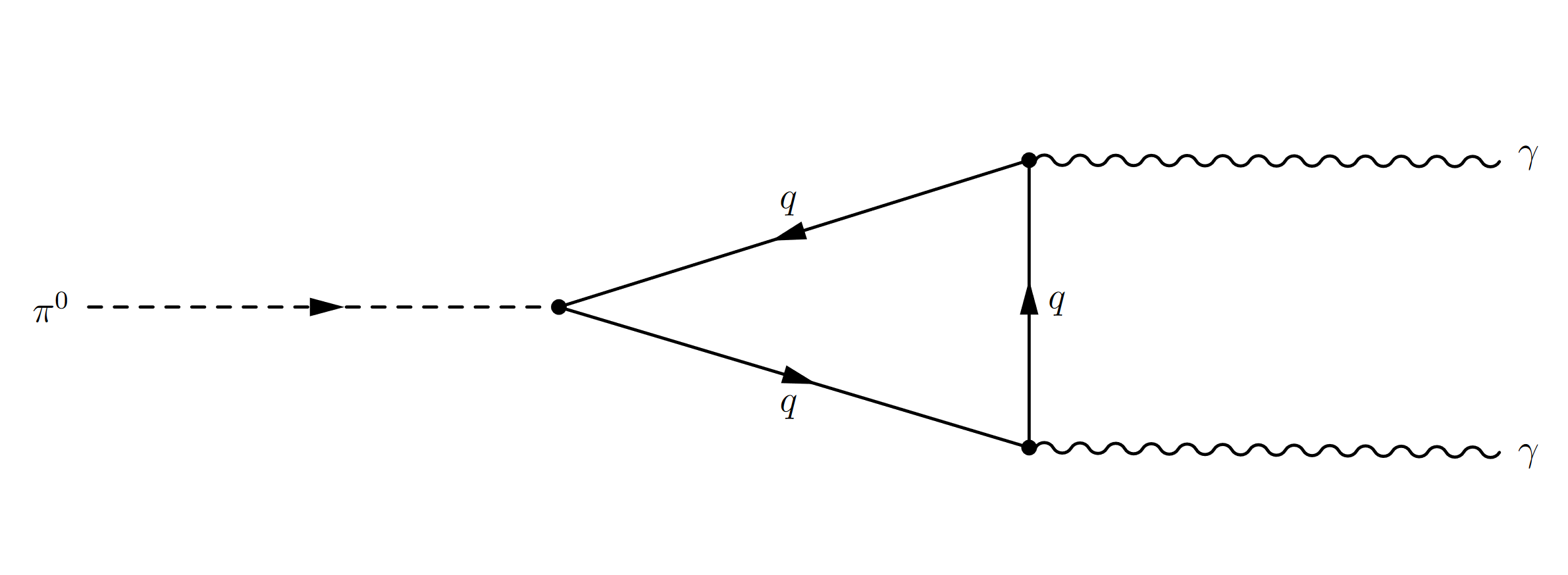 Діаграма аномального розпаду нейтрального пі-мезону на два фотони